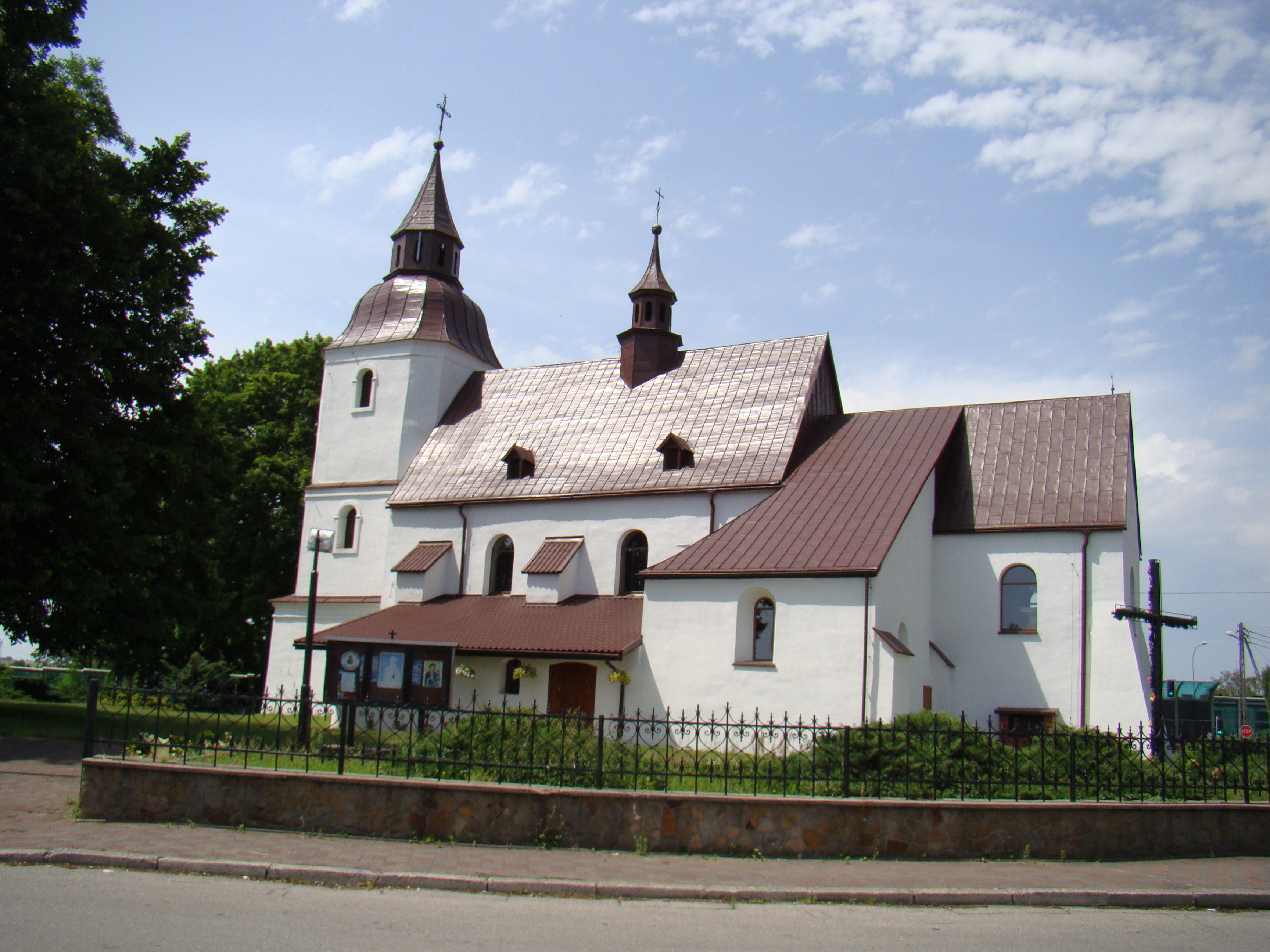 Wojkowice Kościelne, kościół par. pw. Świętych Marcina i Doroty, 1 poł. XIII, XV, XVIII w.